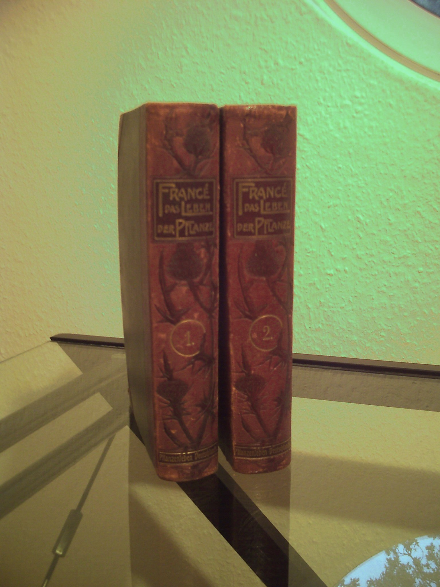 Die ersten beiden Bände von "Das Leben der Pflanze"